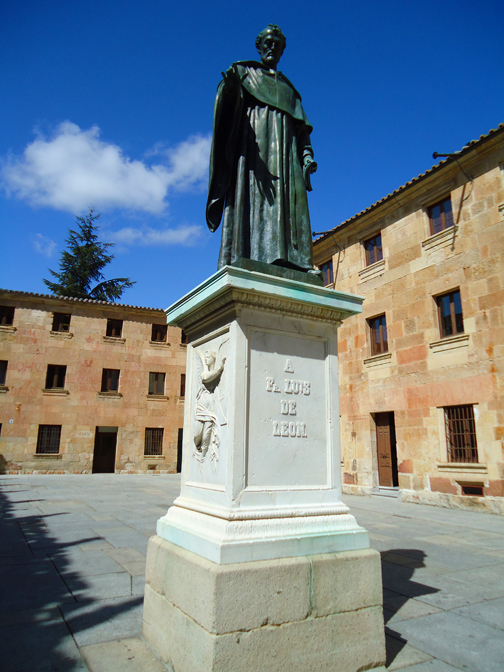 Patios Escuelas Mayores